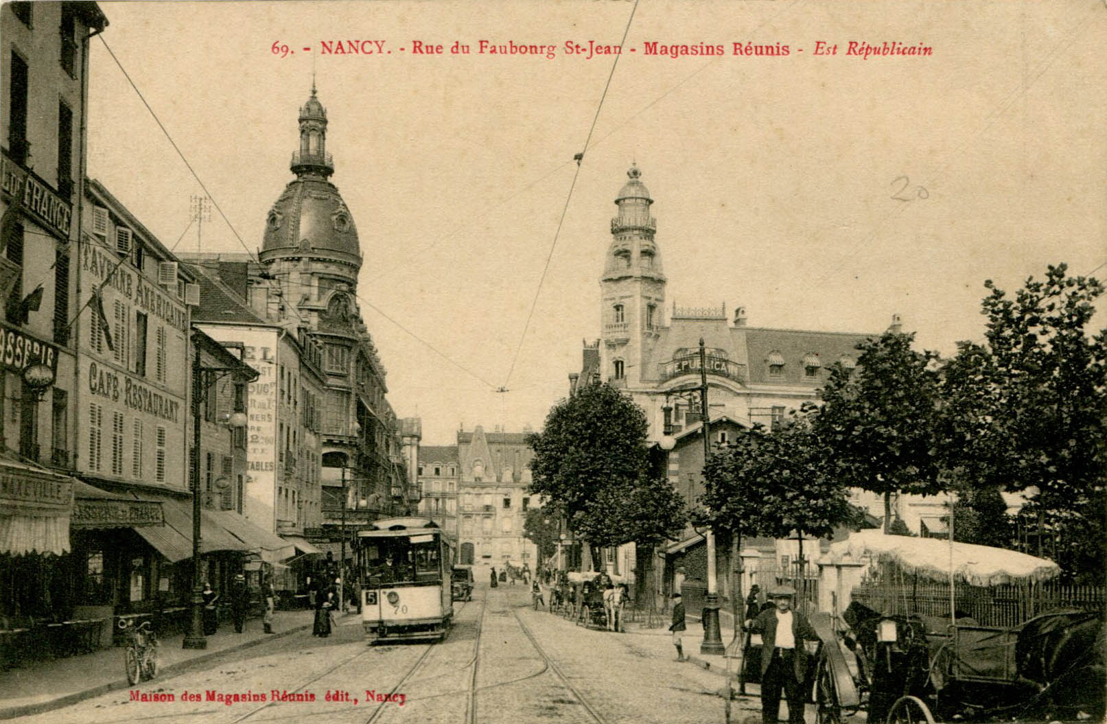 Carte postale ancienne (1913) de la rue du faubourg Saint-Jean (actuelle avenue Foch) à Nancy avec un tramway qui circule. À gauche la coupole des Magasins réunis et lui faisant face (à droite), la tour d'angle du siège du journal L'Est républicain.